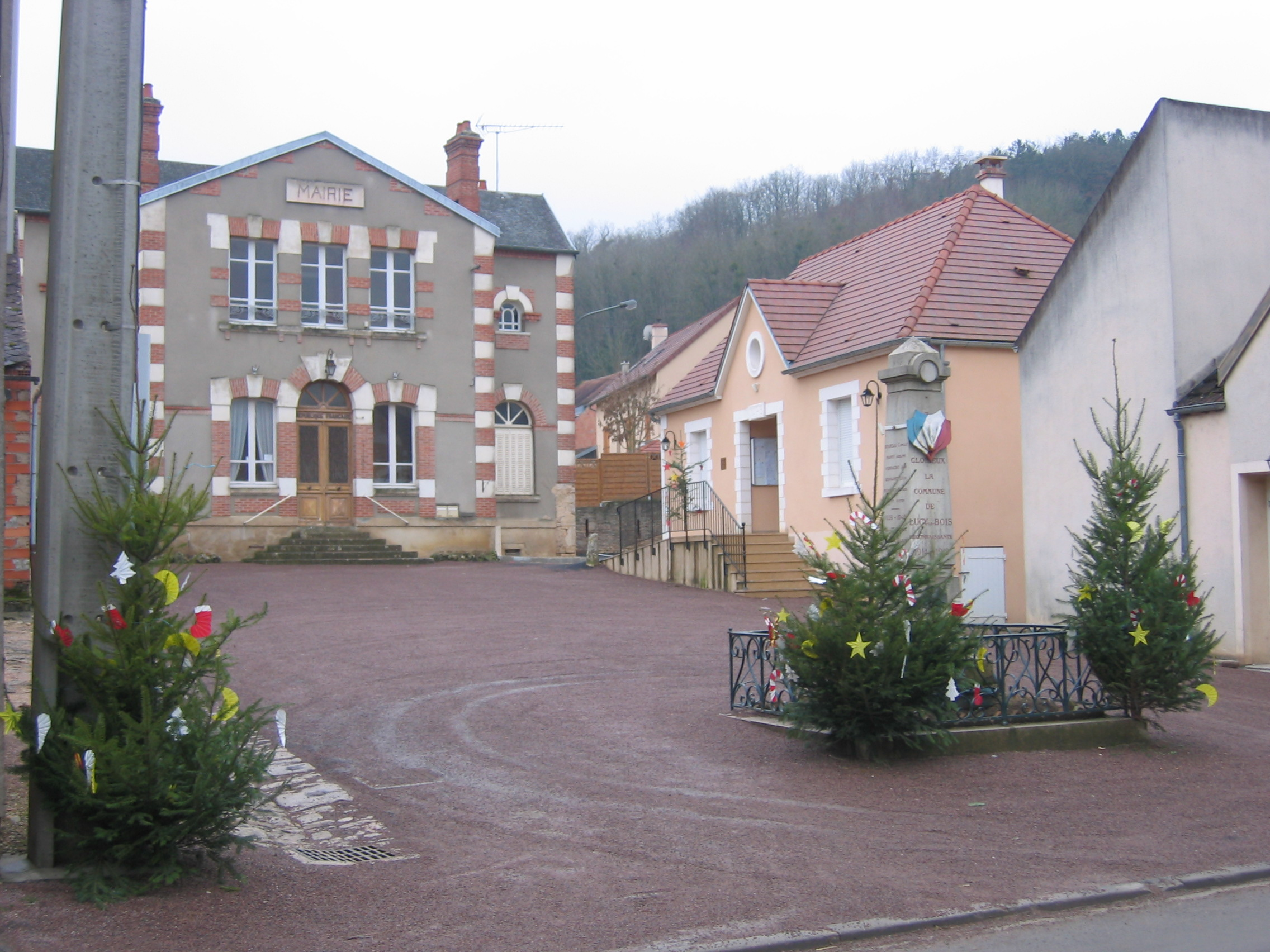 Lucy-le-bois